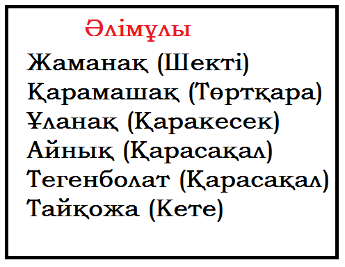 Әлімұлы рулары